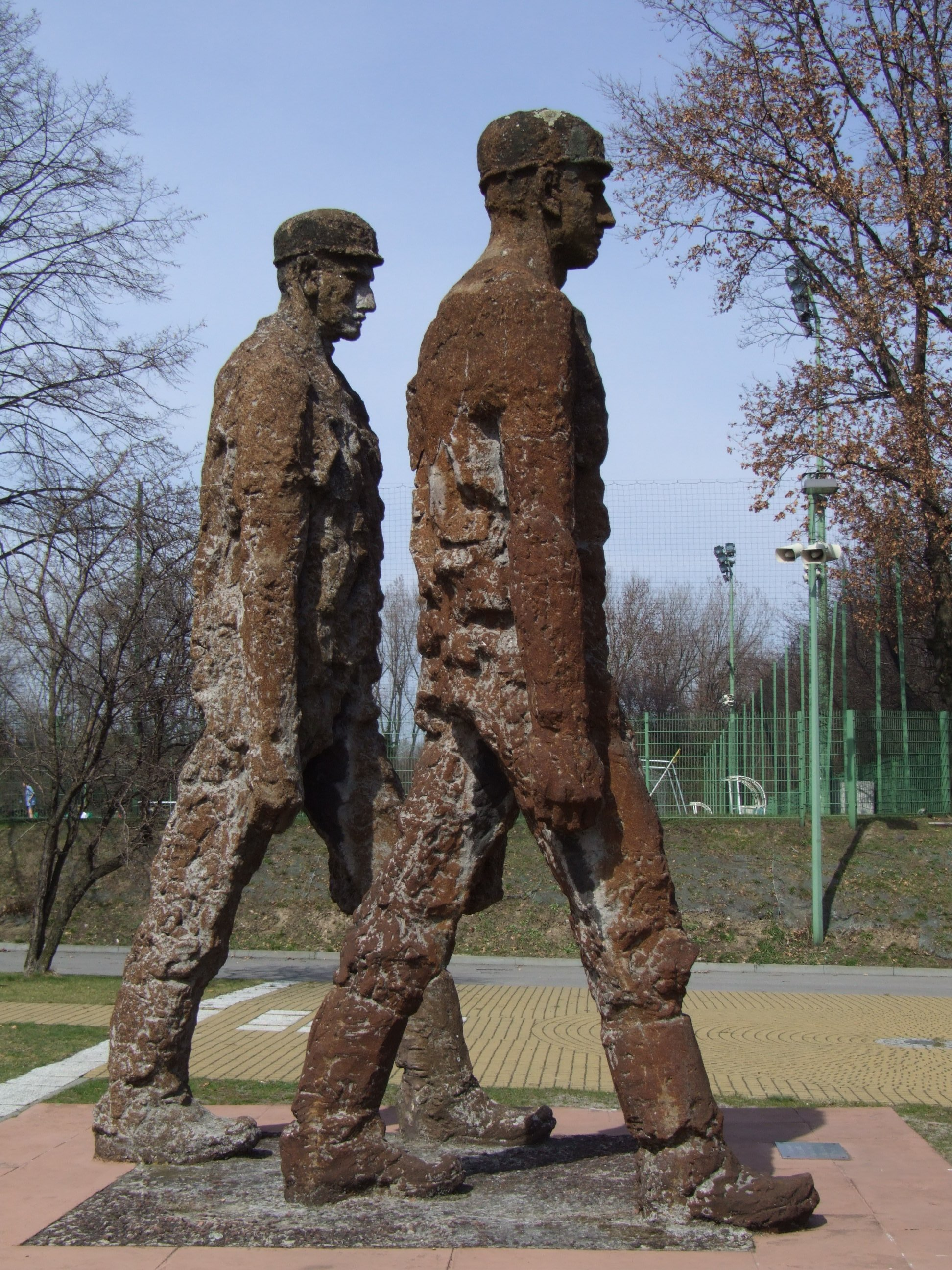 Rzeźba "Górnicy" w WPKiW w Chorzowie